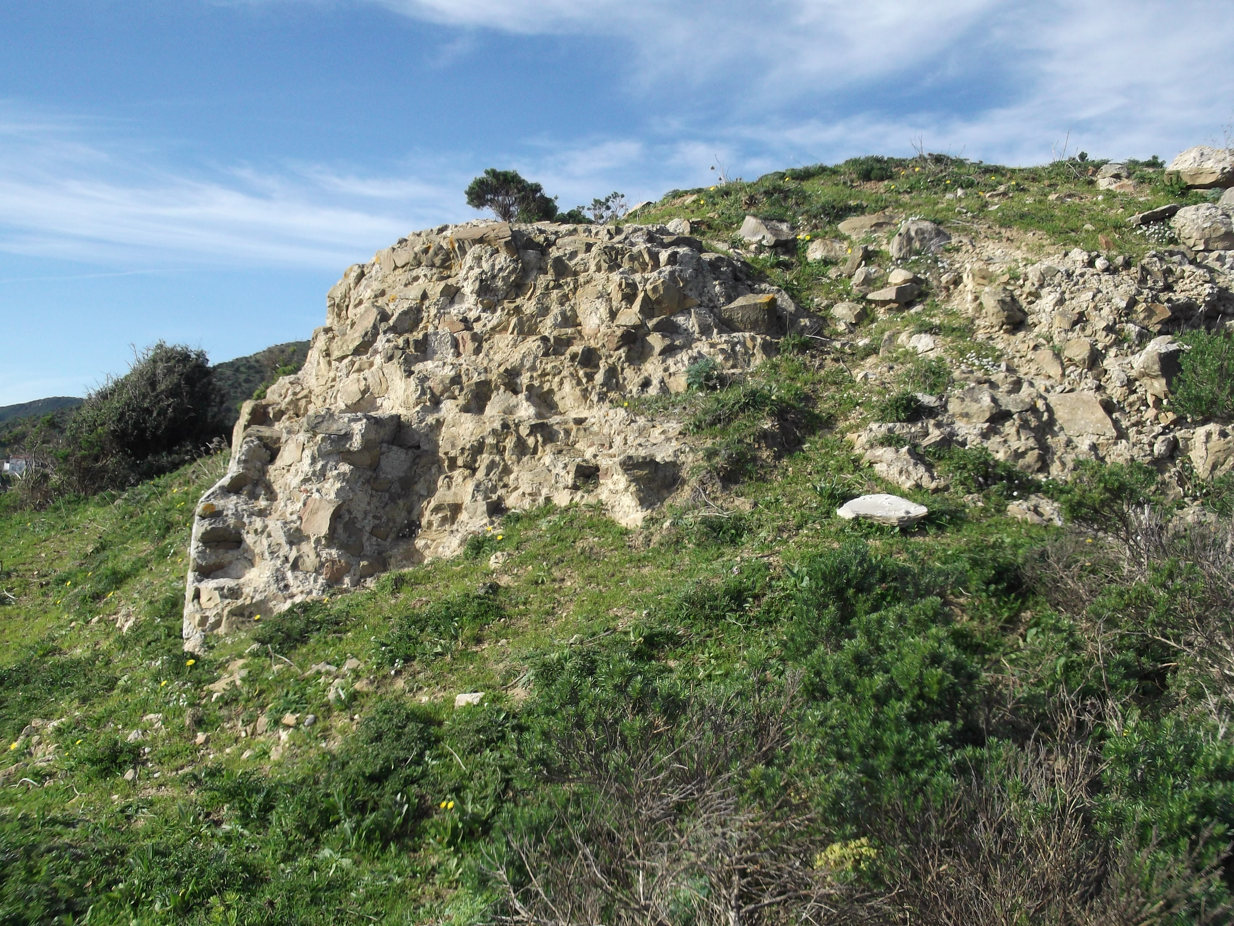 Restos de la Torre de Punta Carnero. Algeciras, Andalucía, España